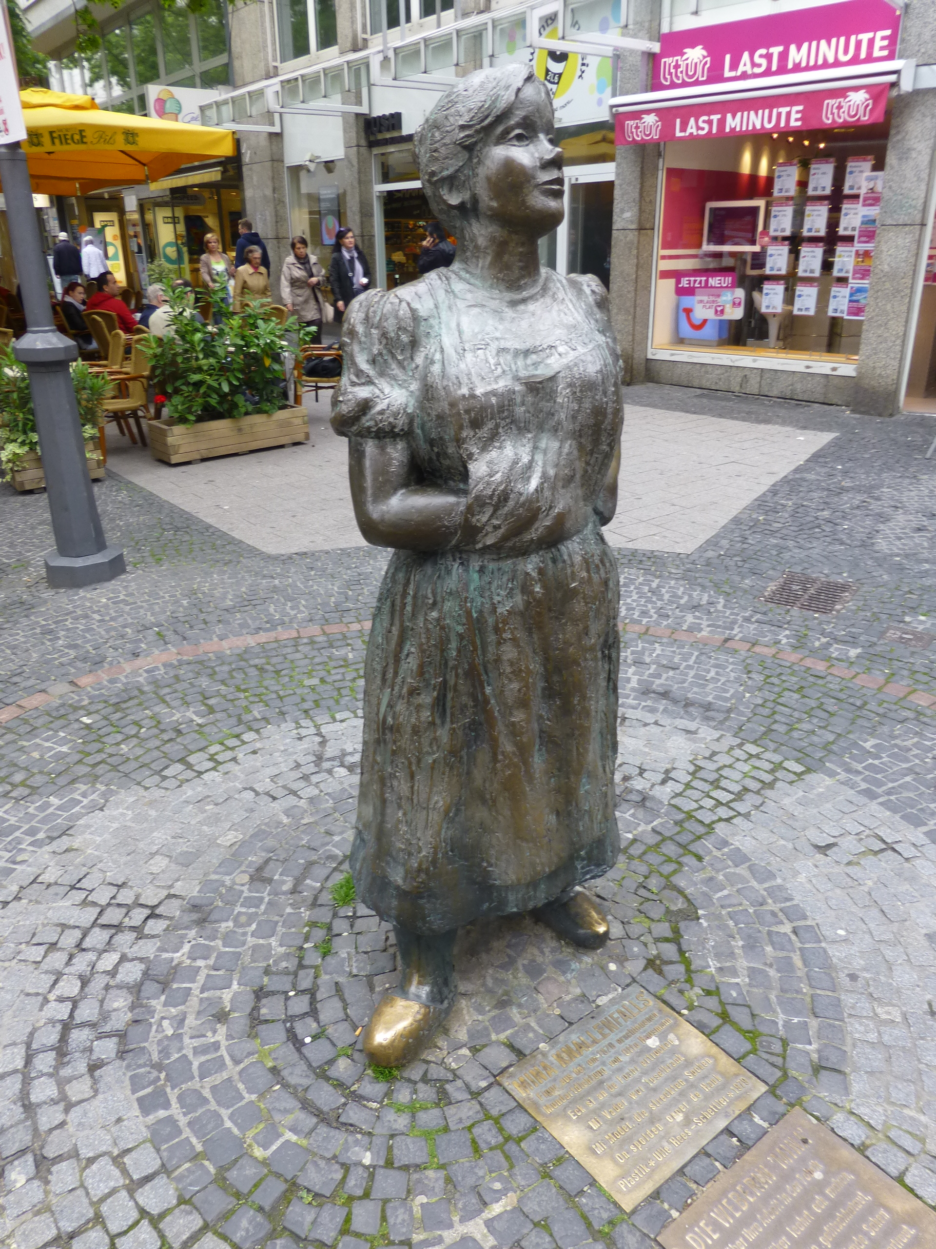 Alte Freiheit, Wuppertal